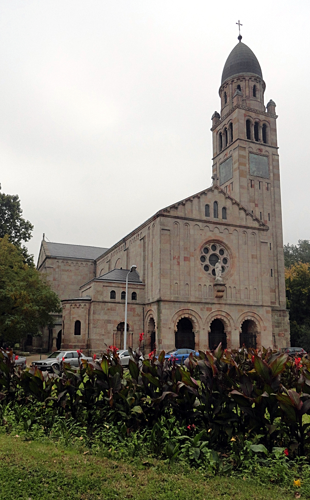 A ferencvárosi Páli Szent Vince-plébániatemplom. - Magyarország, Ferencváros